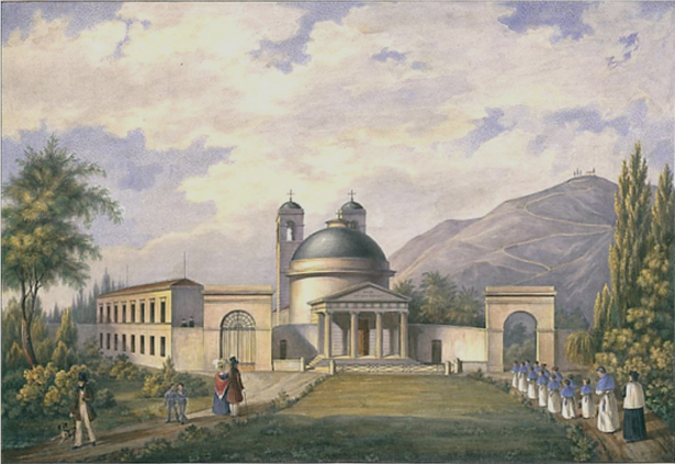 Tempietto e Orfanotrofio sul Colle di S. Rocco, Ceneda.